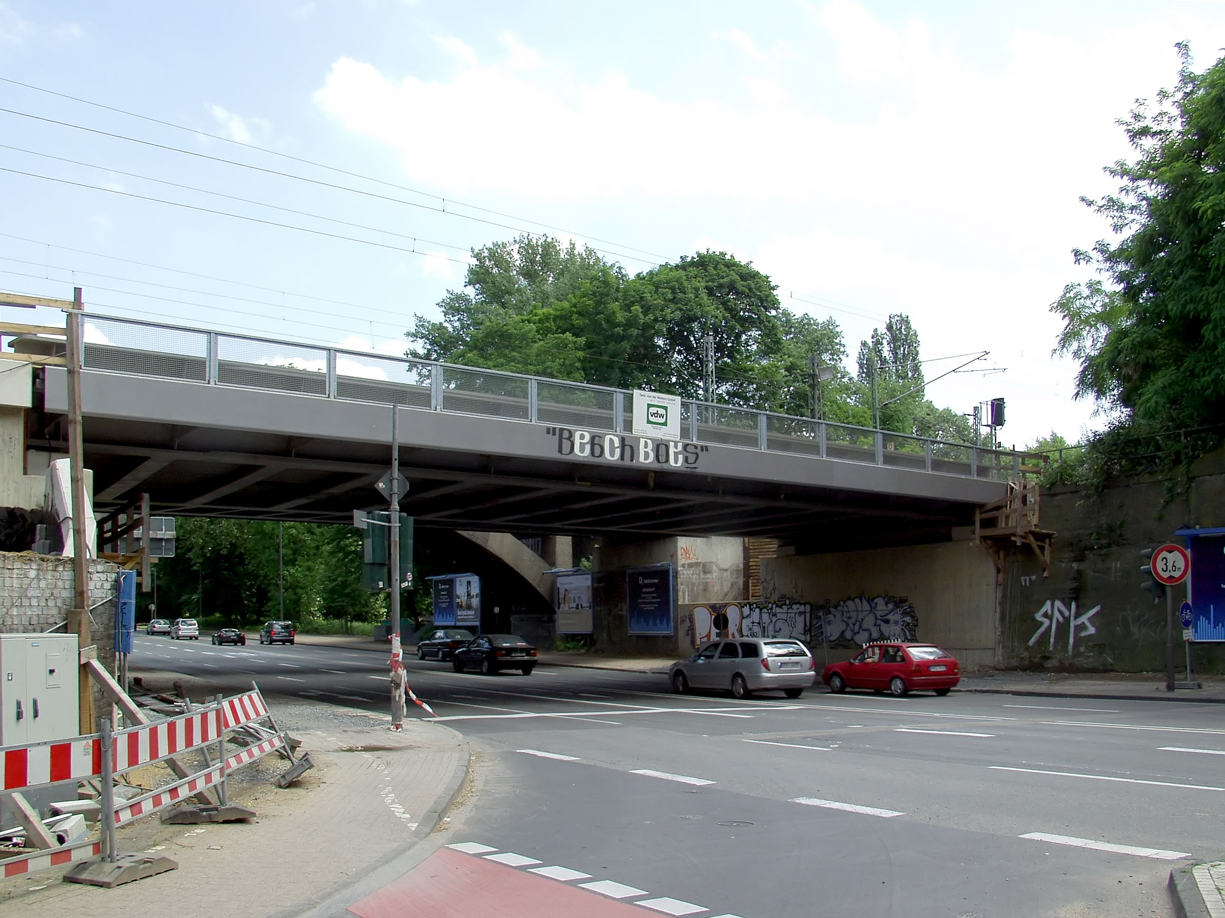 Eisenbahnbrücke (Ersatz für die frühere Idiotenbrücke) im Gleisdreieck Köln, Kreuzung Innere Kanalstraße/Hornstraße.